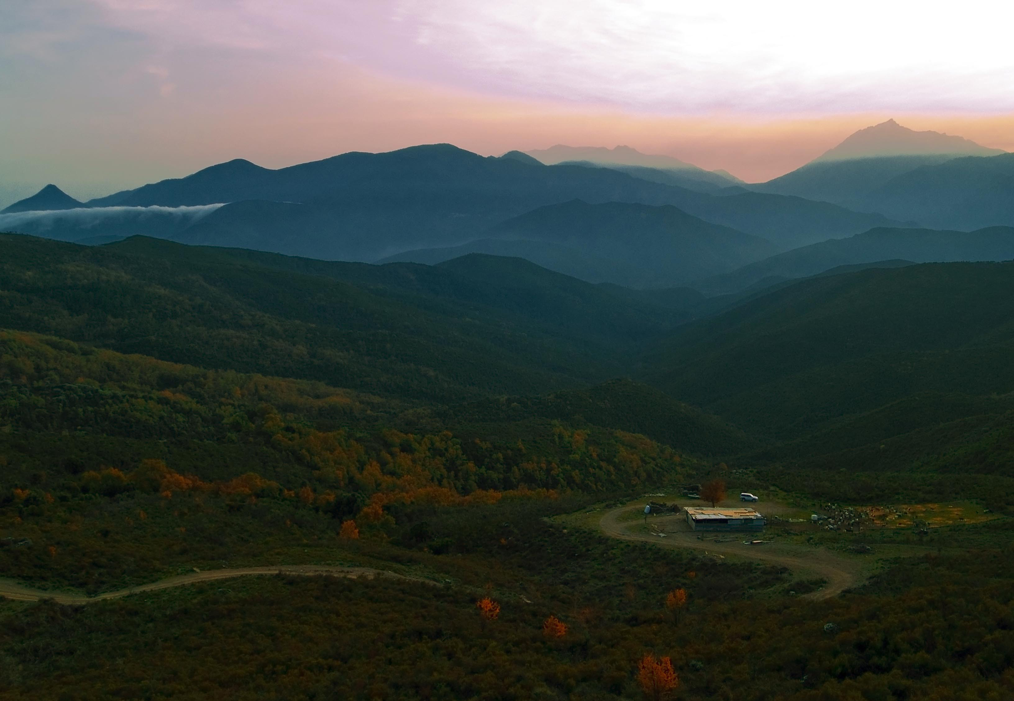 Vue vers le sud depuis Erbajolo après le coucher du soleil